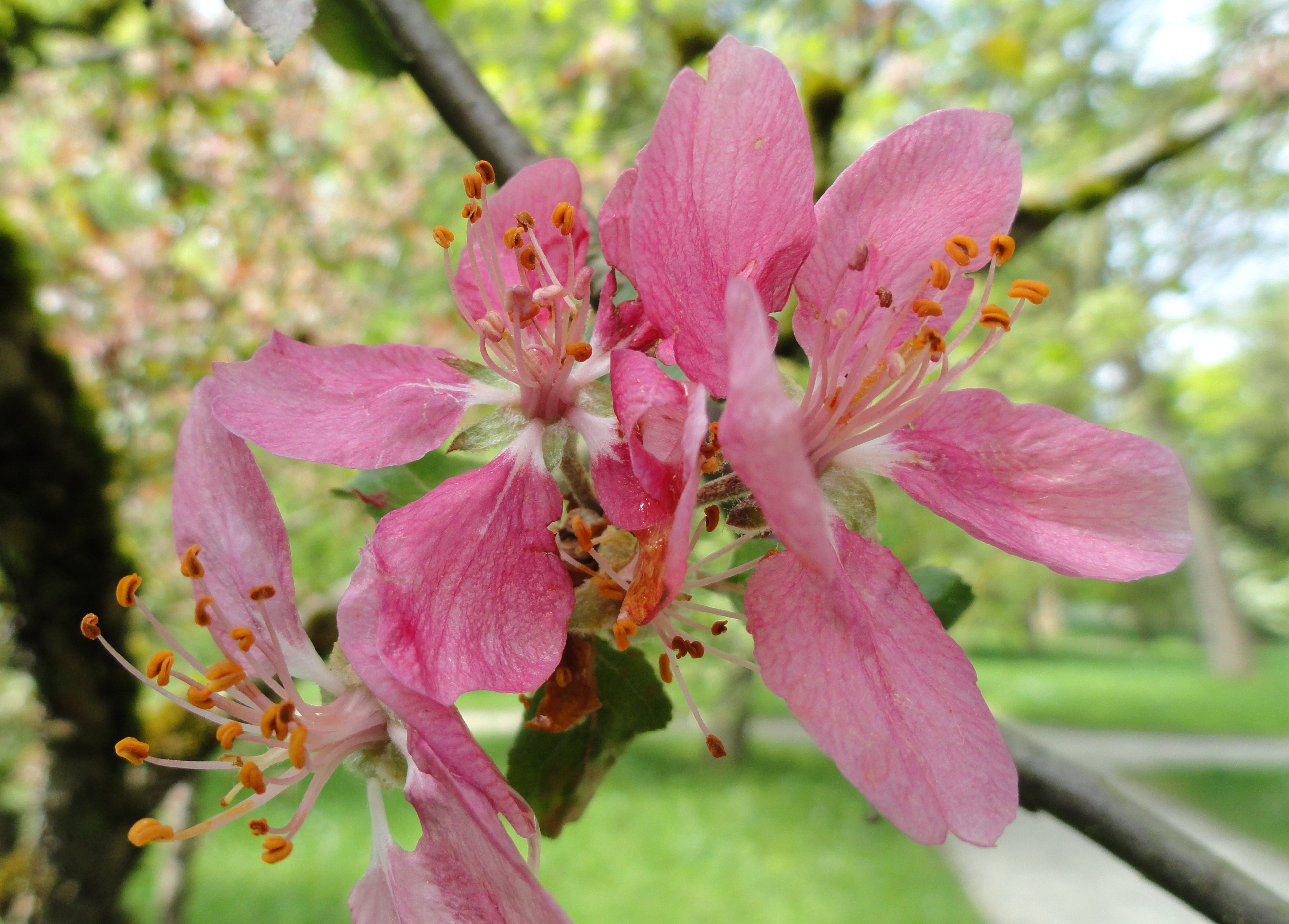 Malus prattii specimen in the Botanischer Garten München-Nymphenburg, Munich, Germany.